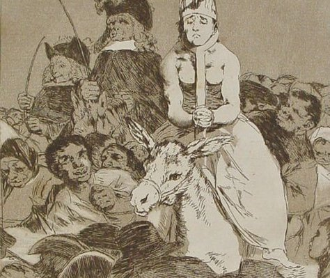 No hubo remedio.-Detalle 1 del Capricho nº 24: Francisco Goya y Lucientes, Pintor de Goya, serie Los Caprichos